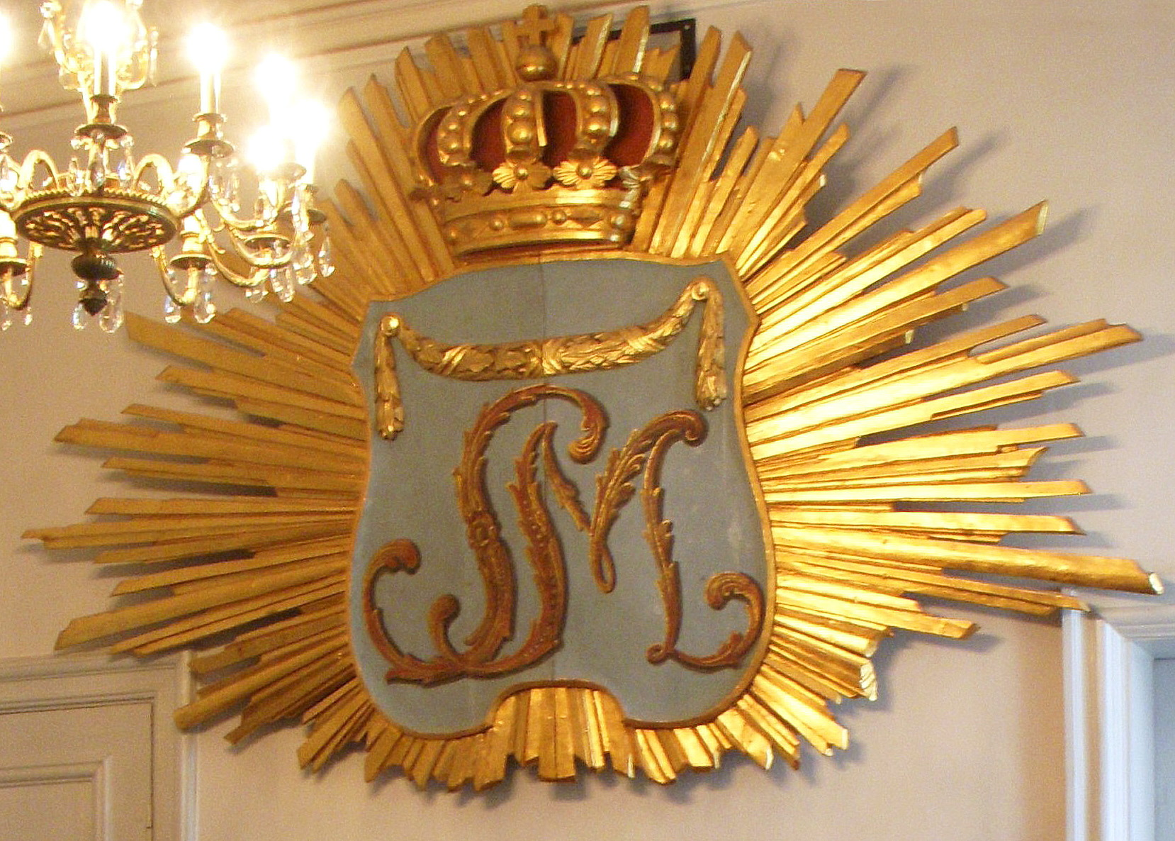 Edsbergs slott Stora Jungfrukammare, Sofia Magdalenas bröllopssköld